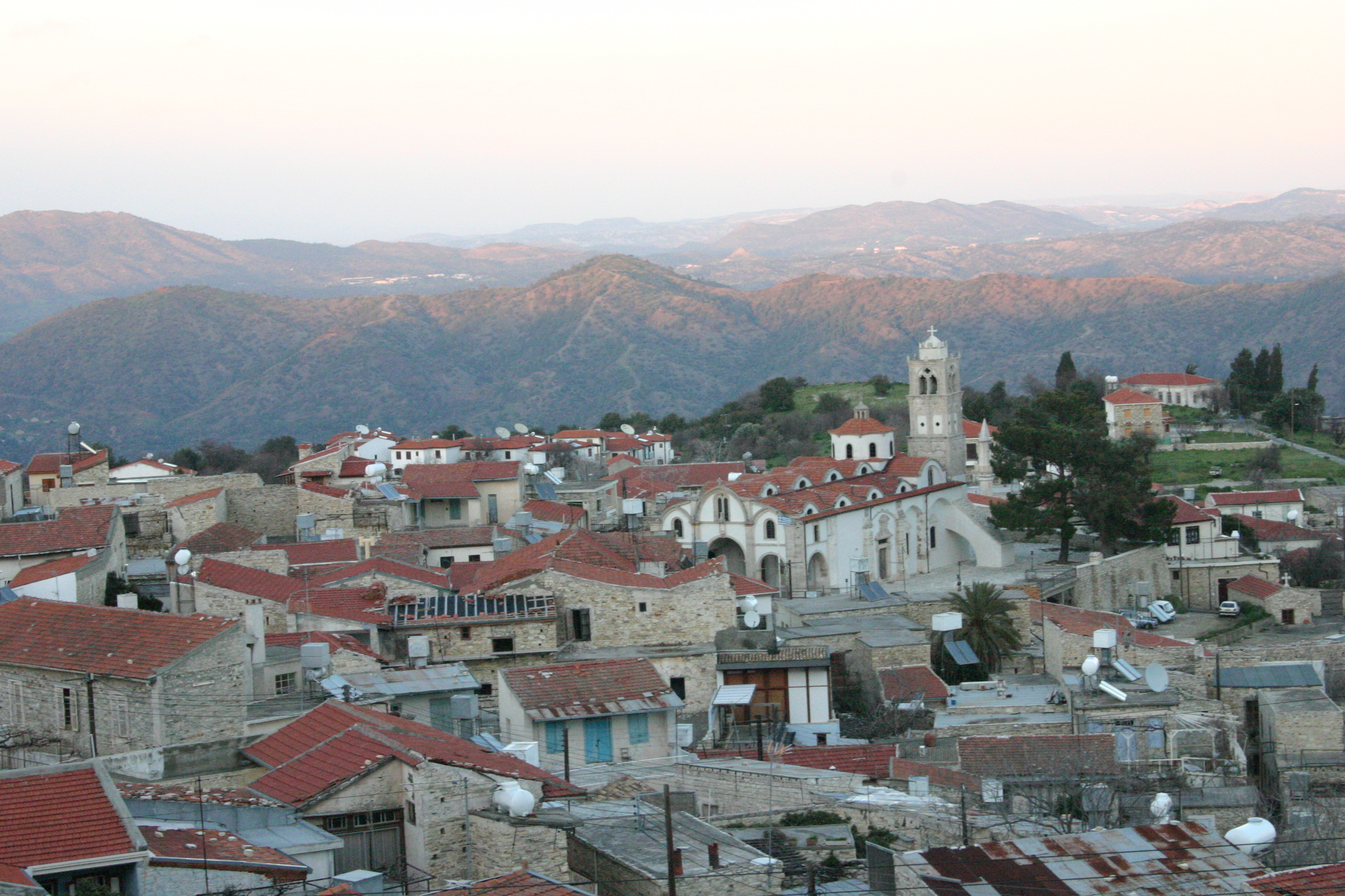 Lefkara